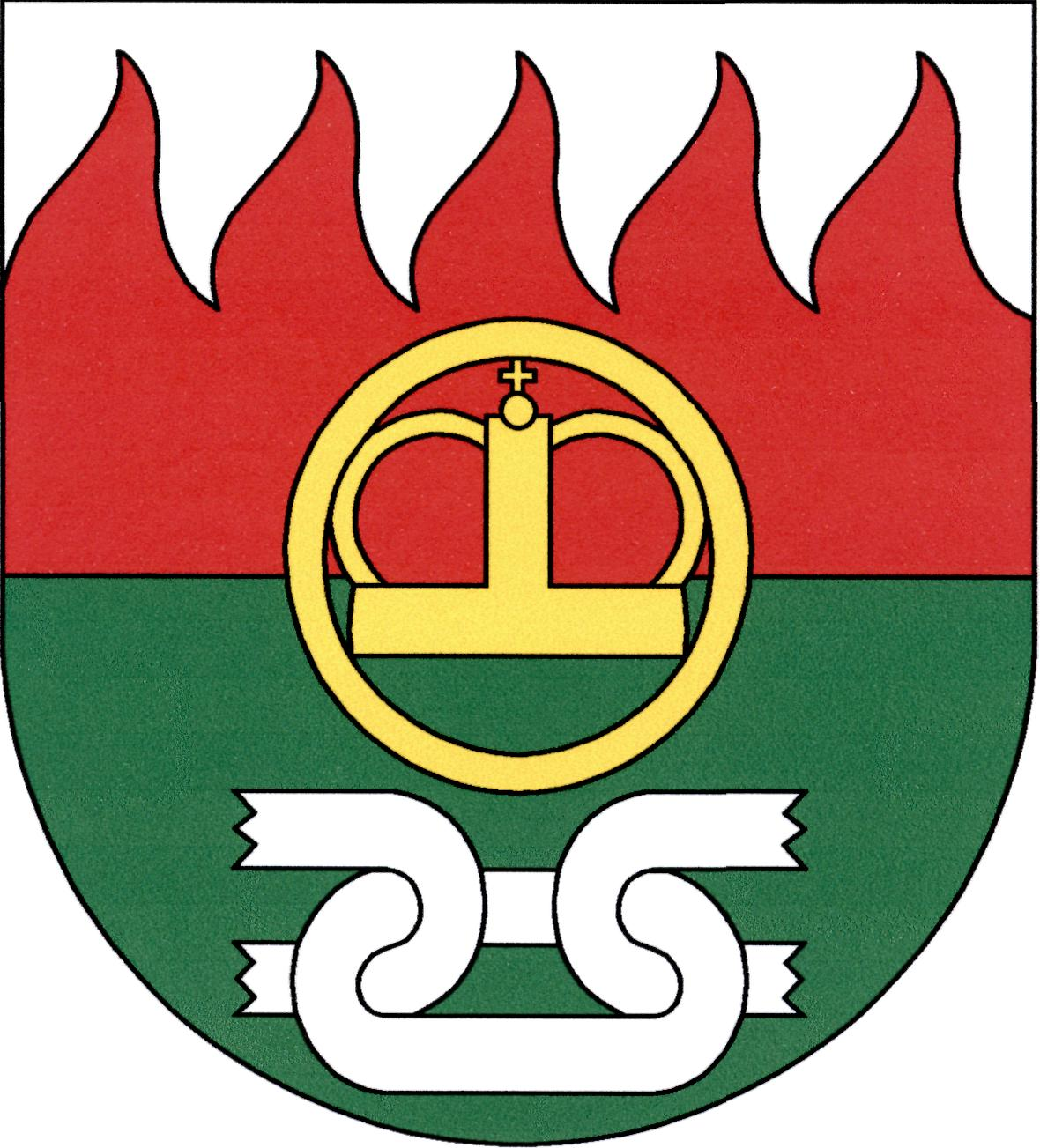 Znak obce Hobšovice